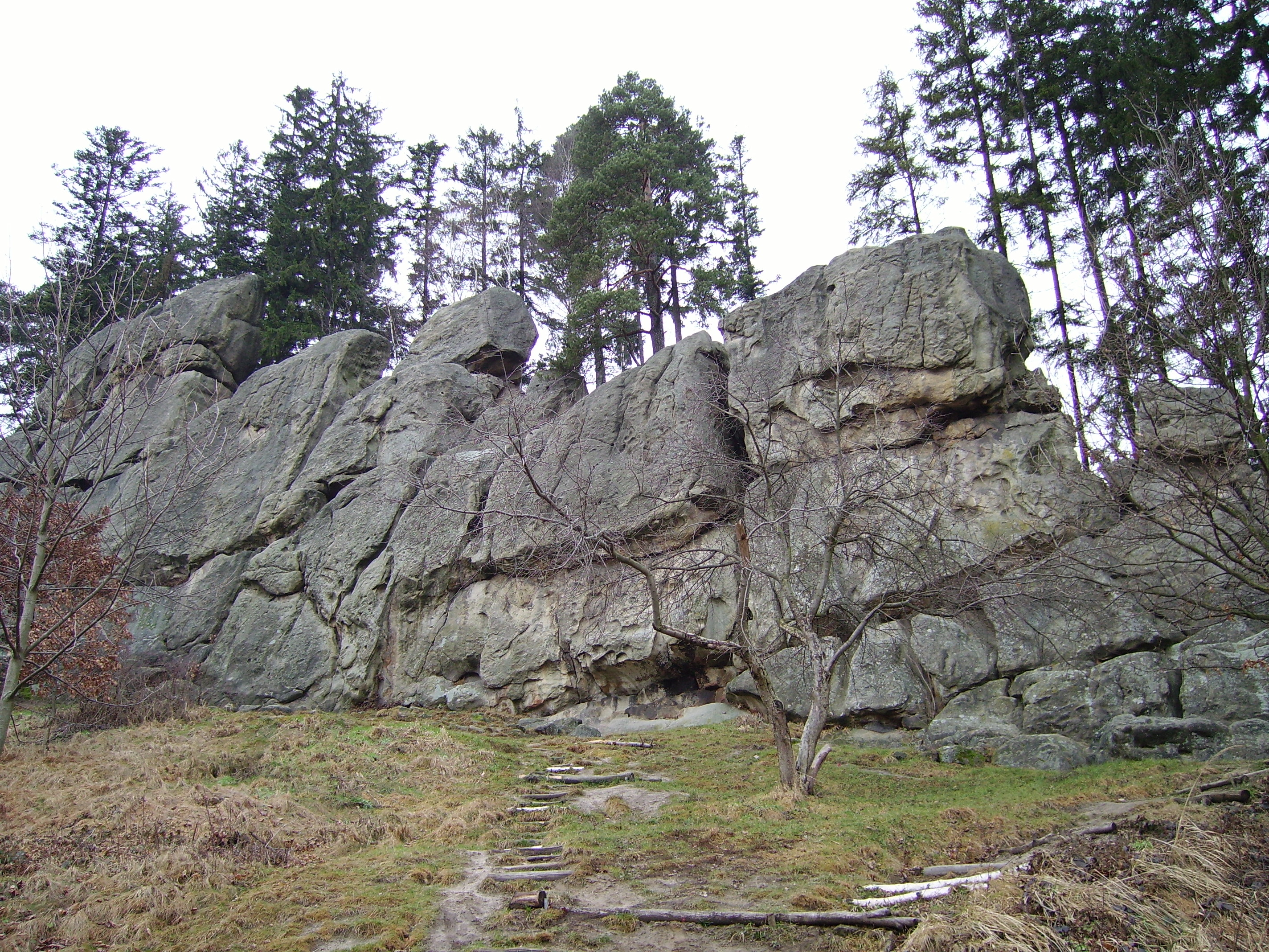 Přírodní památka Čertovy skály, obec Lidečko, okres Vsetín